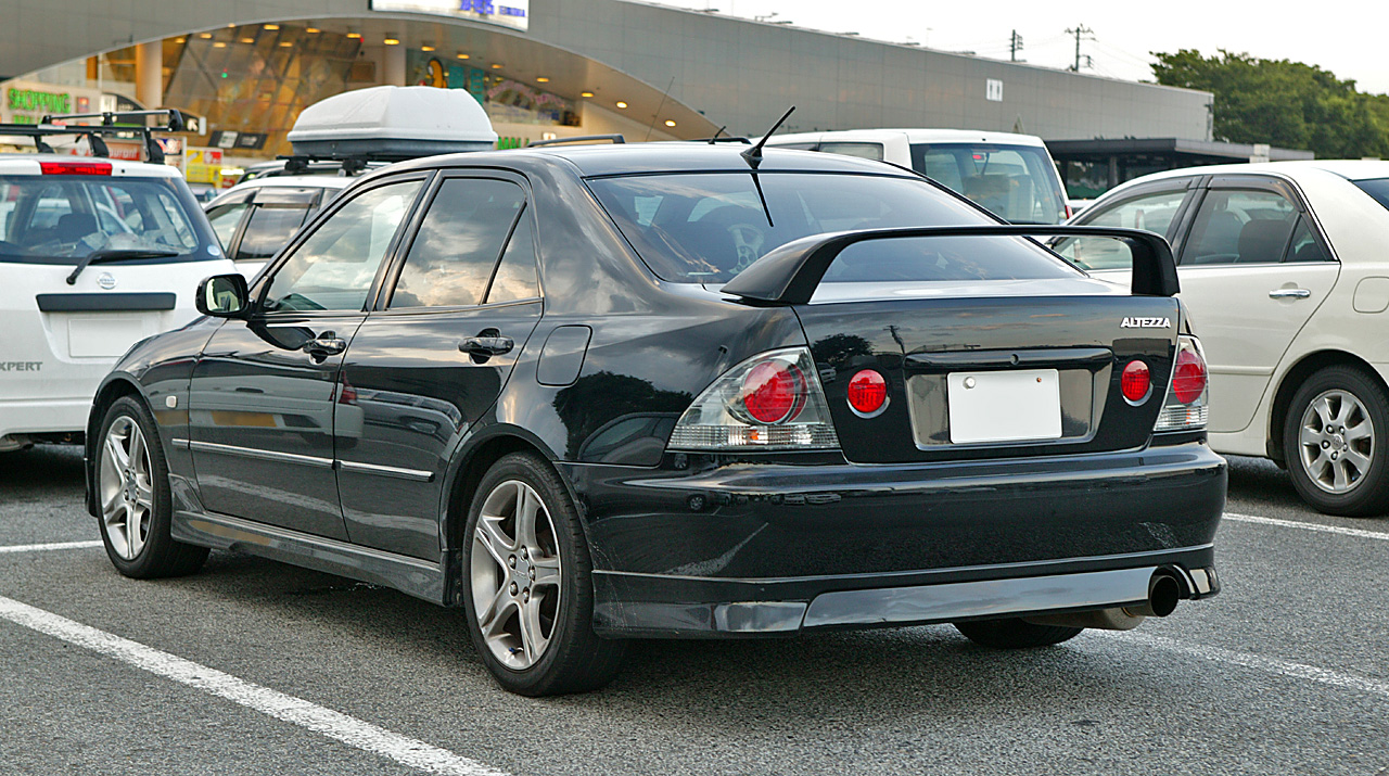 Toyota Altezza